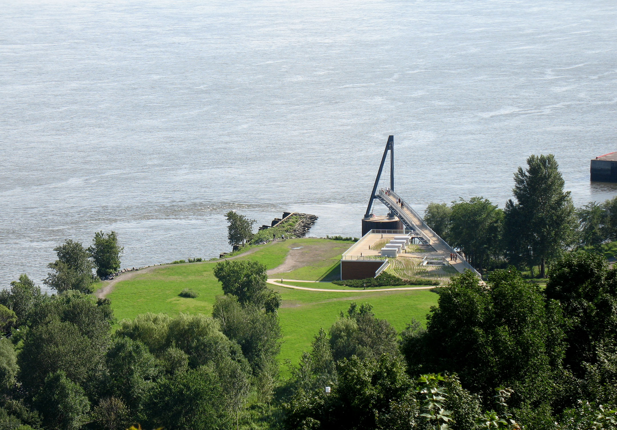 Bassin Brown sur le bord du fleuve Saint-Laurent à Québec, Québec, Canada. Vue des Plaines d'Abraham